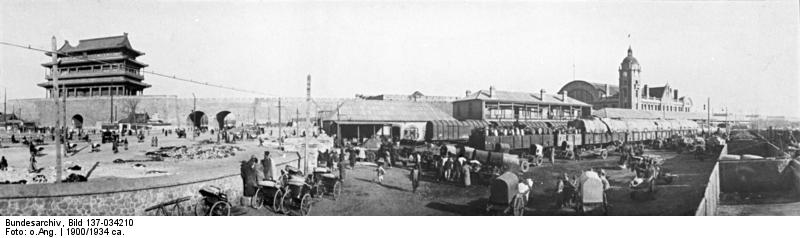 China, Peking, am Bahnhof